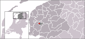 Kaart met de locatie van Ysbrechtum, gemaakt uit sjabloon van Wikipedia-gebruiker Mtcv